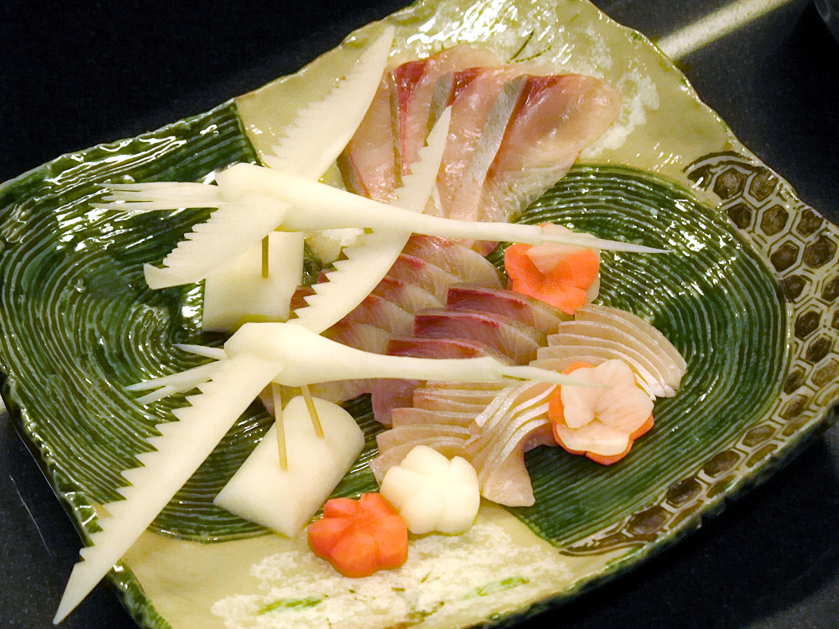 Sashimi-Auswahl auf einer Servierplatte, präsentiert mit aufwendiger Garnierung mit aus rohem Daikon (weißer Rettich) und rohen Karotten geschnitzten „Kranichen“ und „Blütenrosetten“.